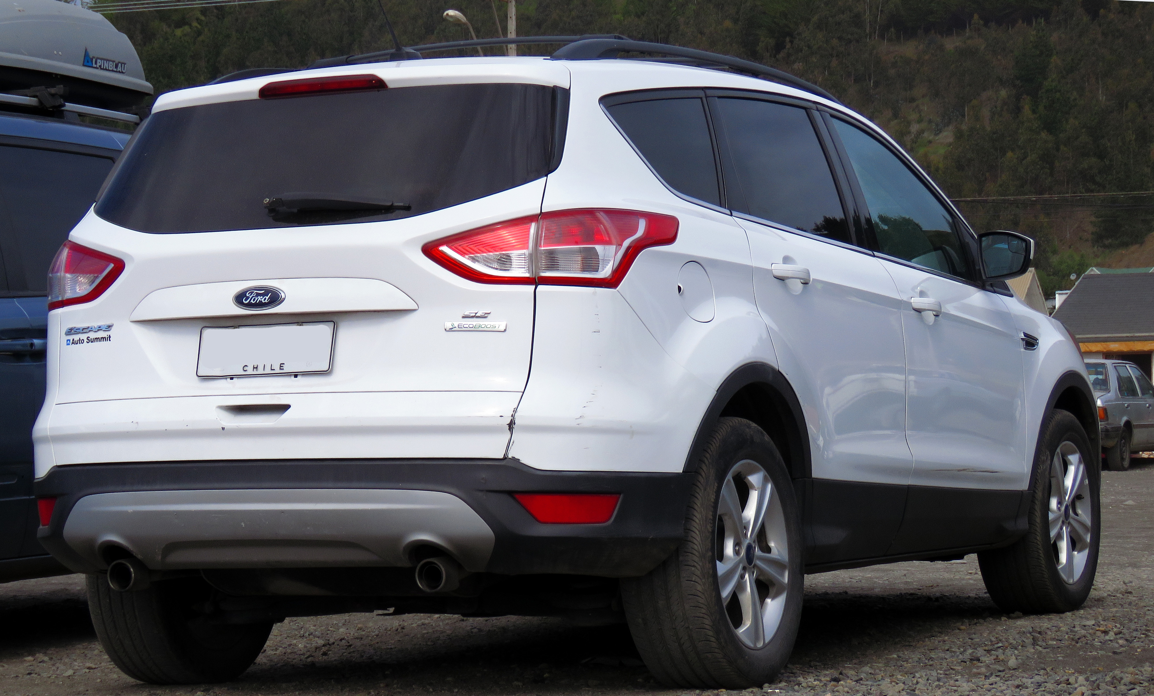 Ford Escape SE 2.0 EcoBoost 2013